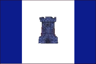 Vlag van de gemeente Bornem